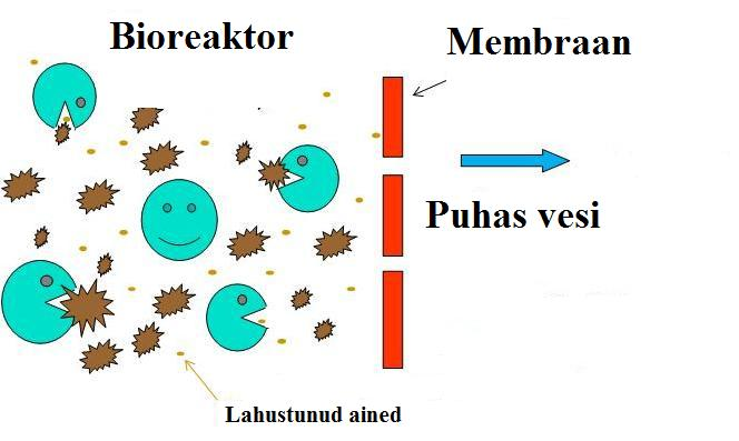 Membraanbioreaktori tööpõhimõte